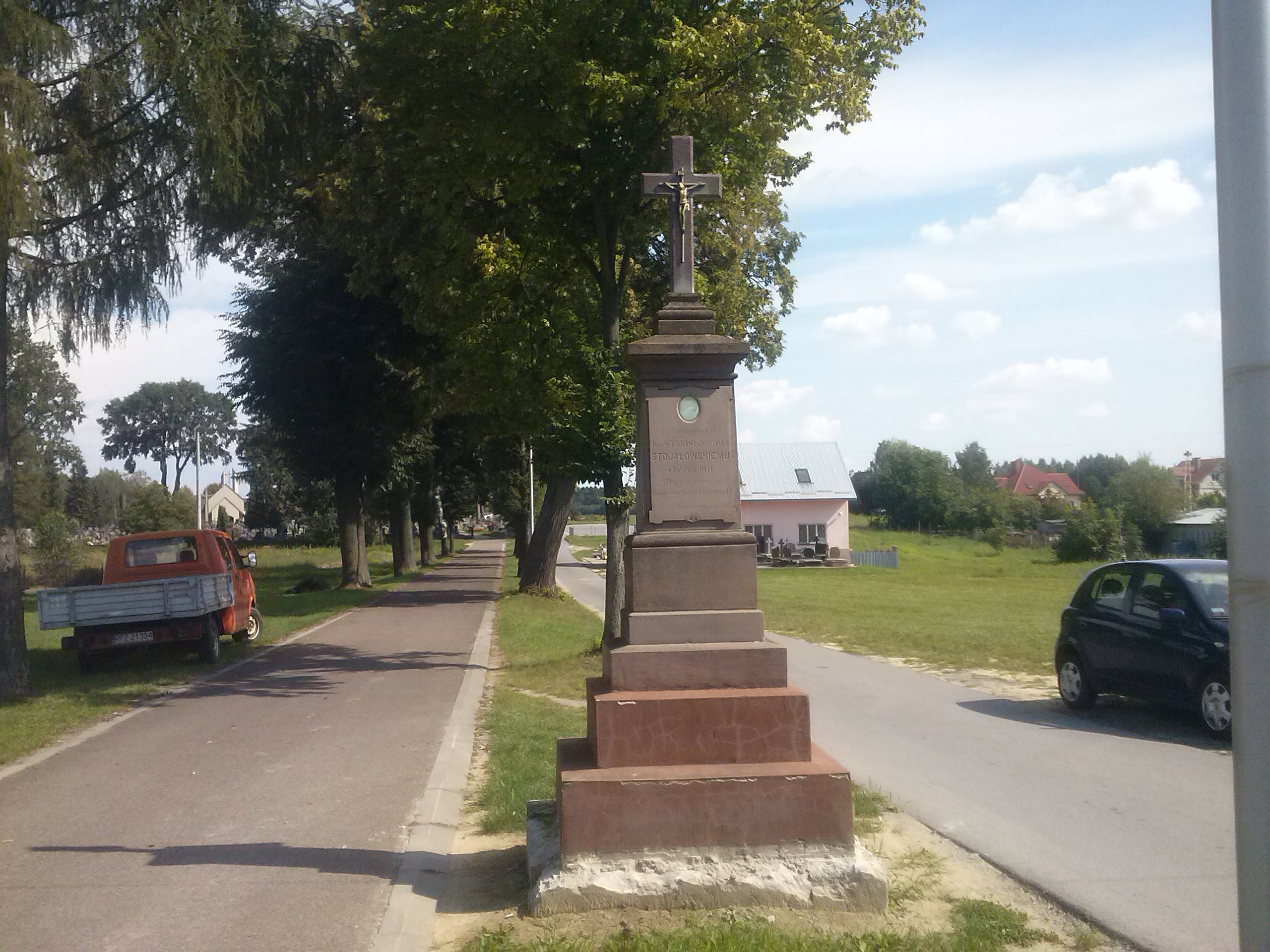 Pomnik Krzyża Świętego w Gniewczynie Łańcuckiej, poświęcony pamięci ks. Stanisława Stojałowskiego